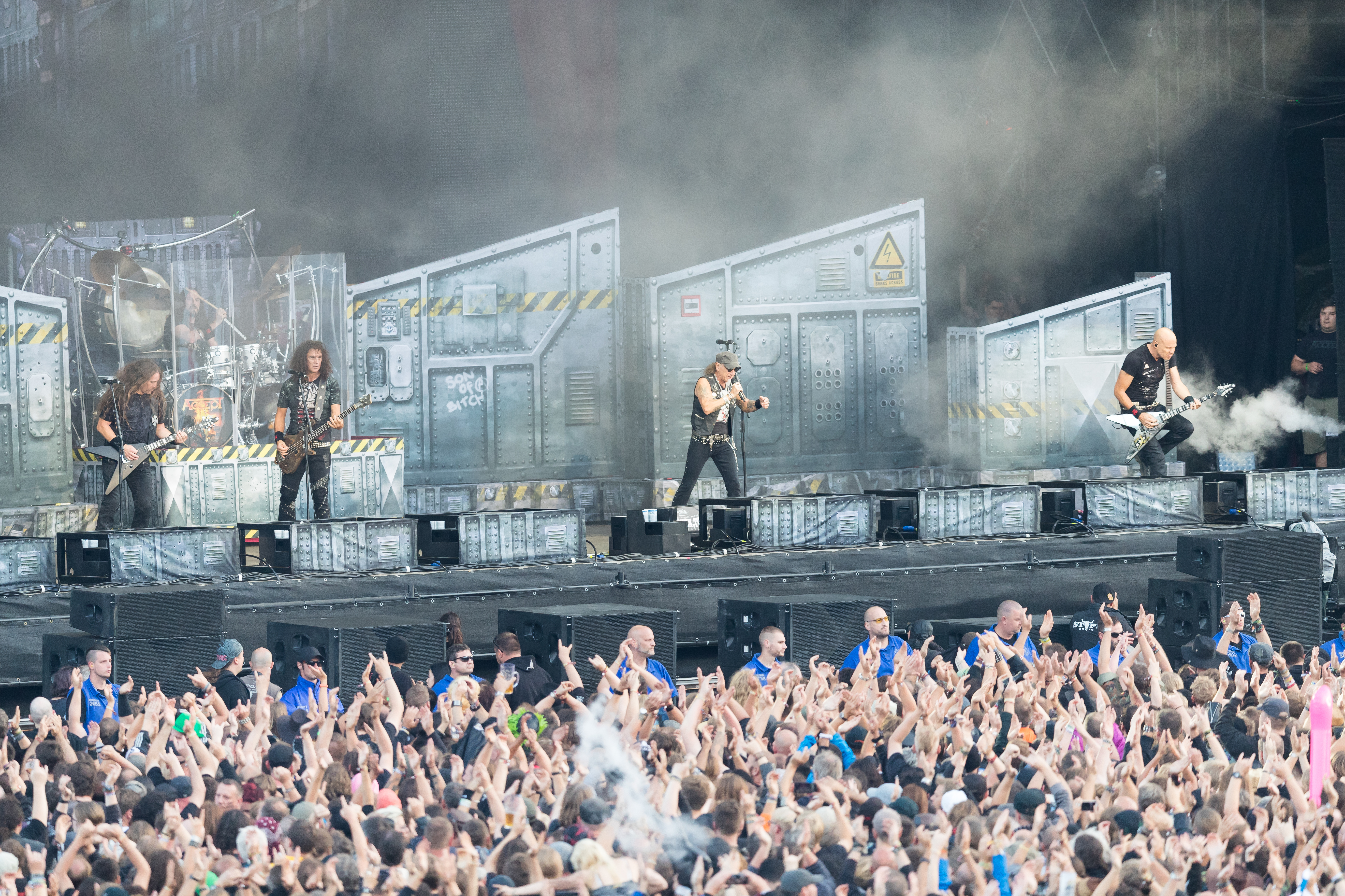 Accept during Wacken Open Air at Schleswig-Holstein, Wacken, , Germany on 2017-08-03, Photo: Sven Mandel